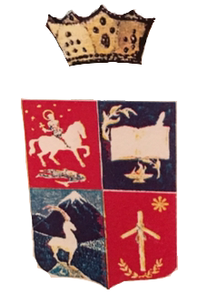 Blason familiale des Gochadzés